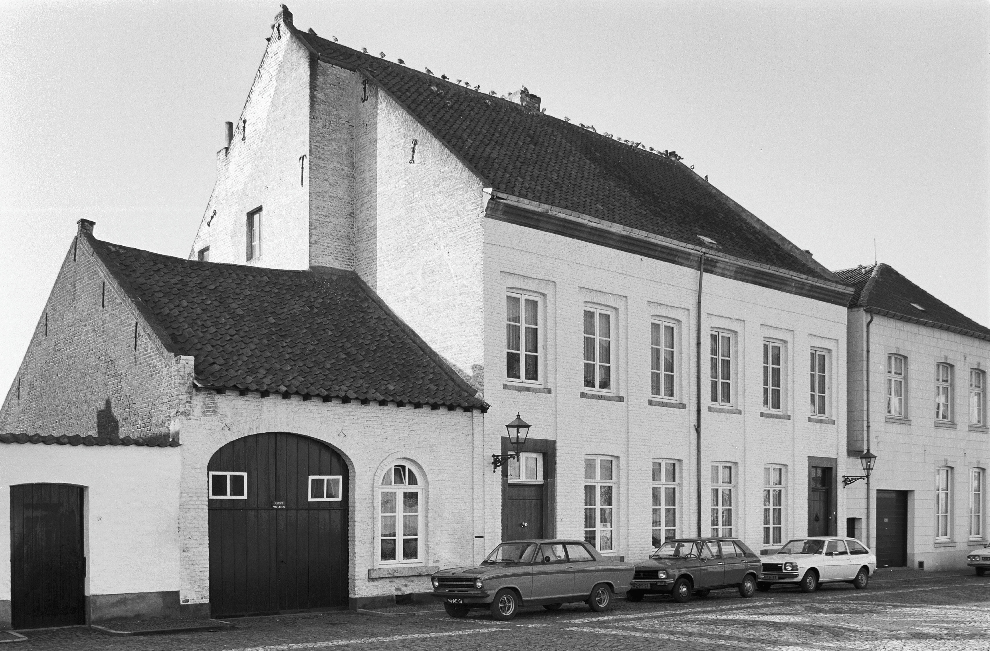 Sint Michaelskerk: voorgevel